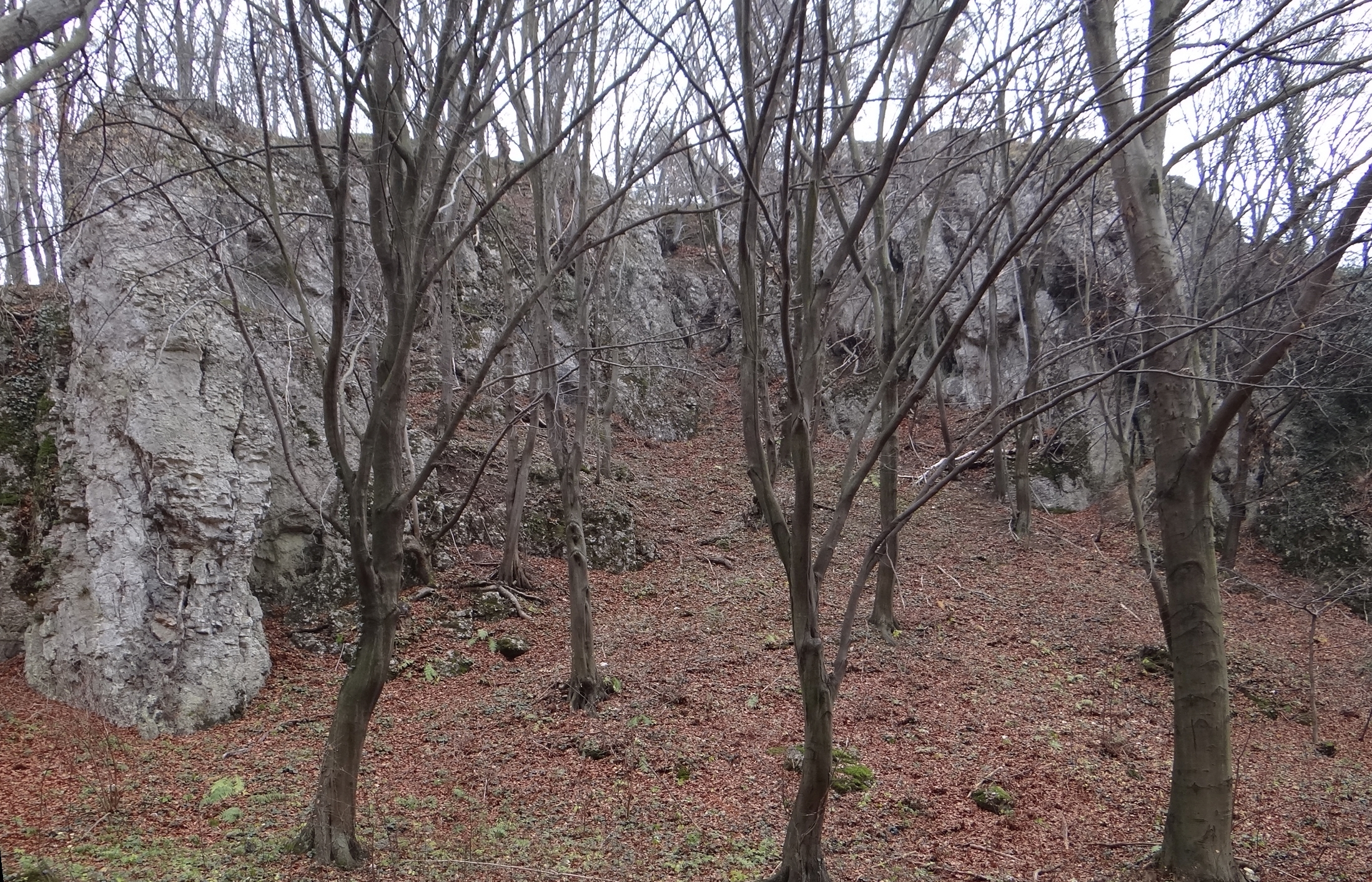 Skały Lotniki w Dolinie Kobylańskiej